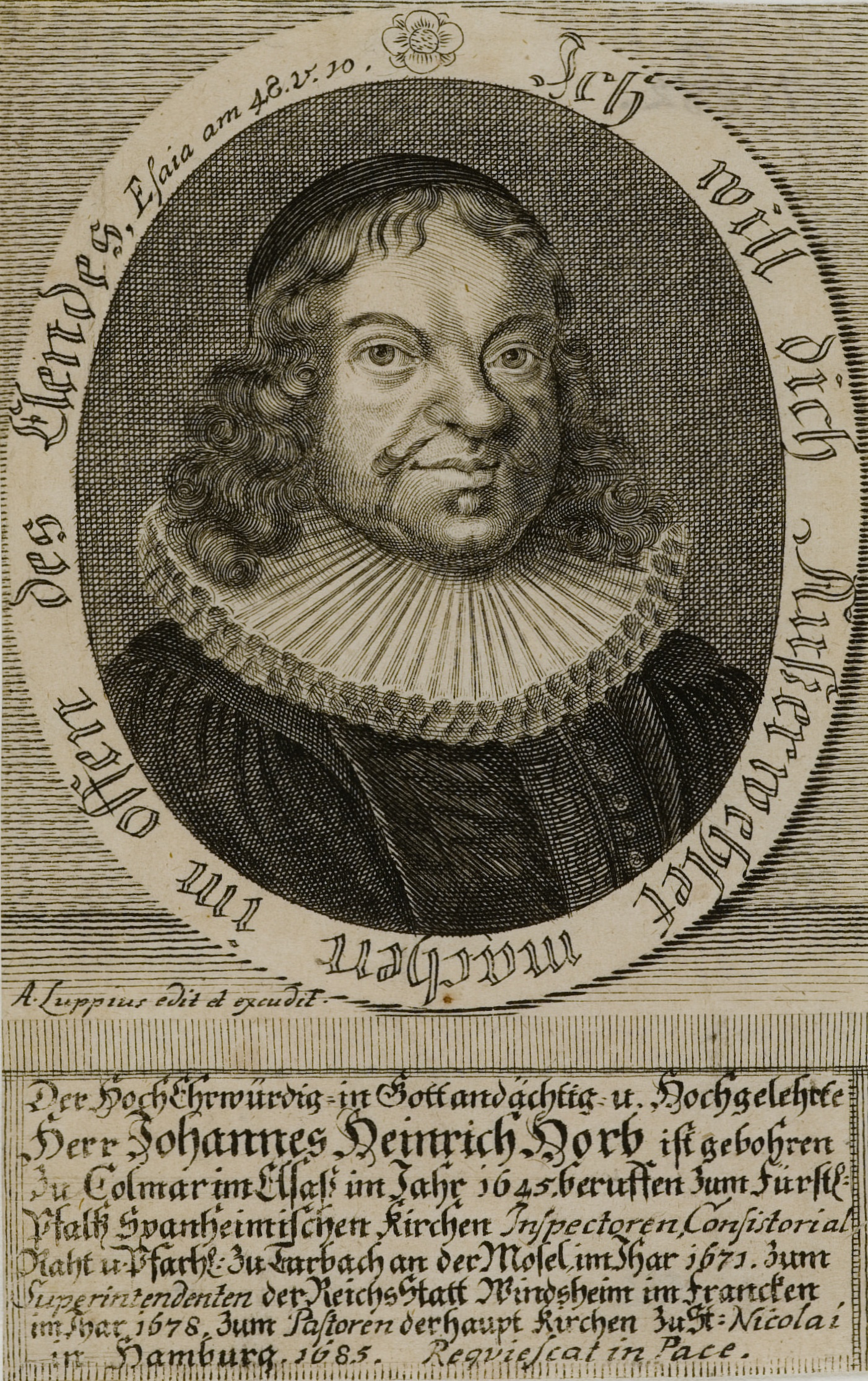 Bildnis von Johann Heinrich Horb